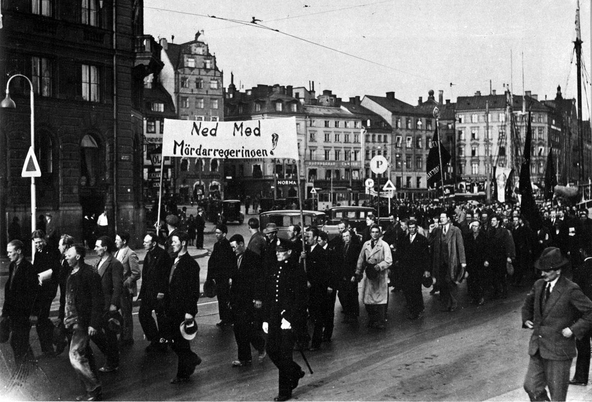 Ådalshändelserna. Demonstration i Stockholm